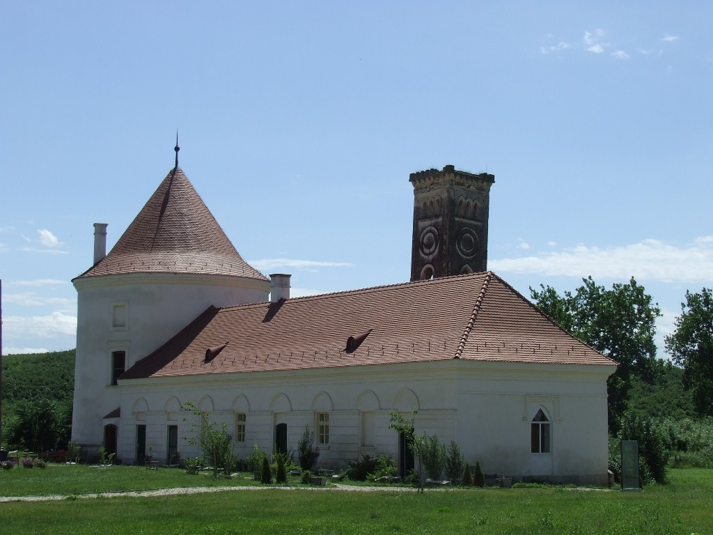 Banffy Castle in Bonţida, Cluj County, Romania